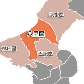 八里區相對位置。